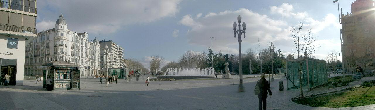 Montaje panorámico de la Plaza de Zorrilla desde la calle Santiago de Valladolid.